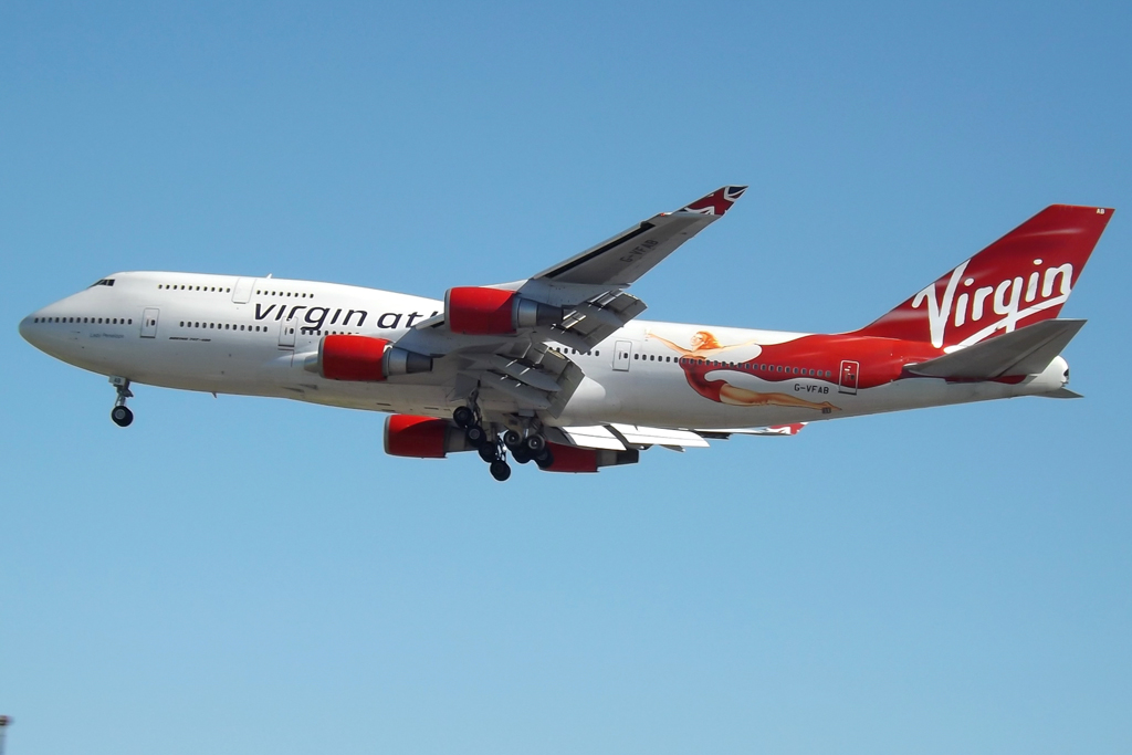 G-VFAB Boeing 747-400 Virgin Atlantic